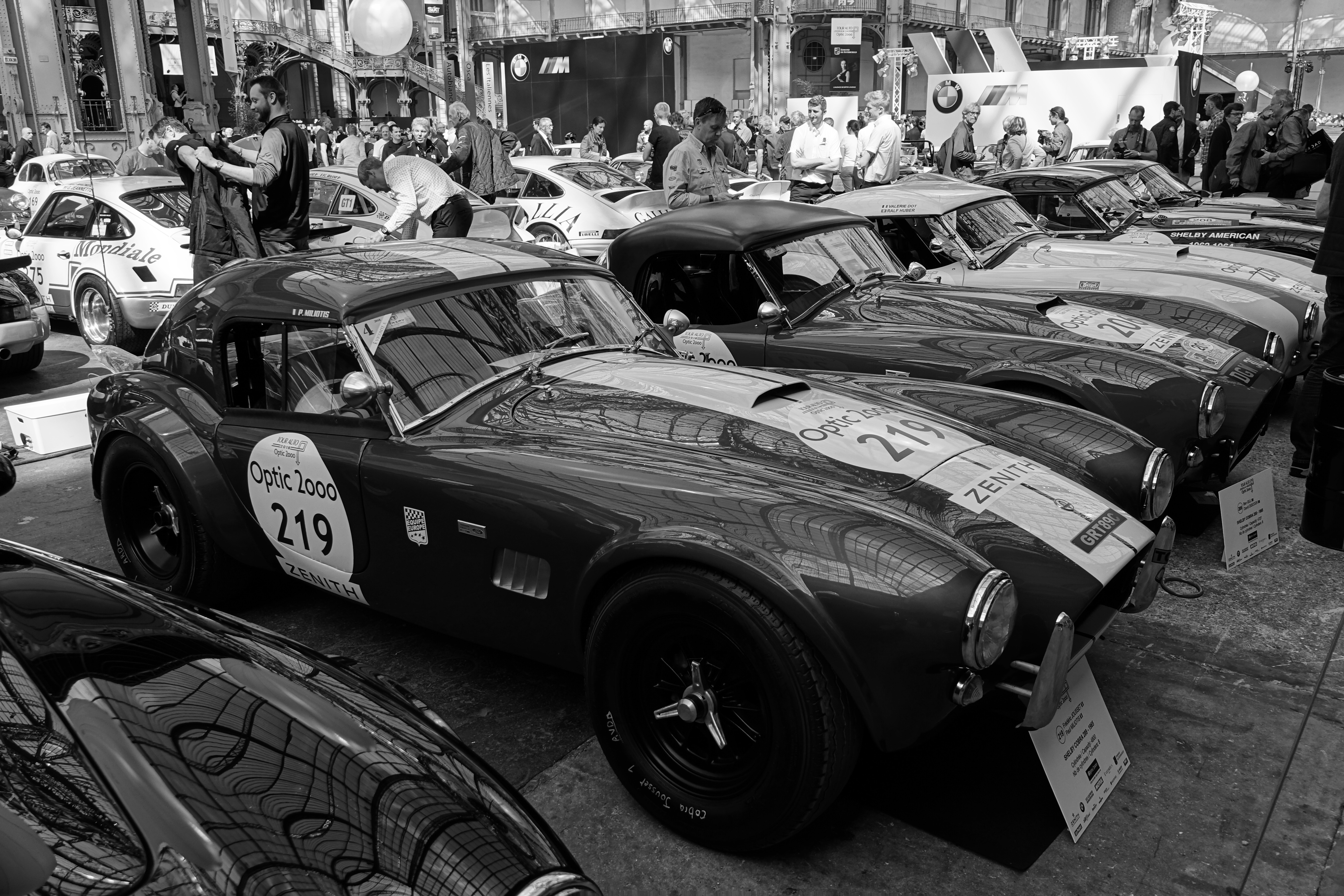 Shelby Cobra 289 au Grand Palais